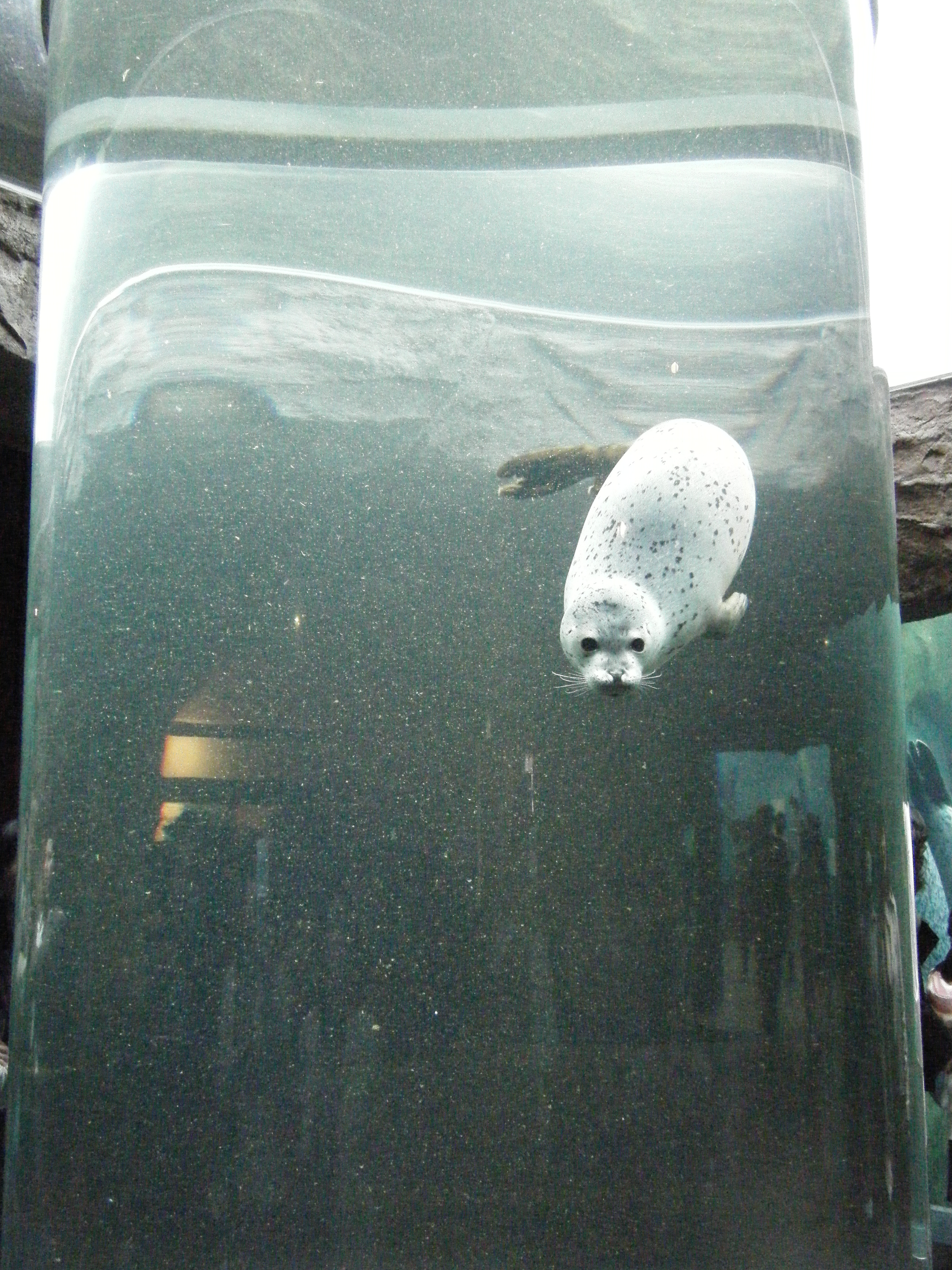 あざらし館のマリンウェイを泳ぐ幼獣。旭川市旭山動物園にて。